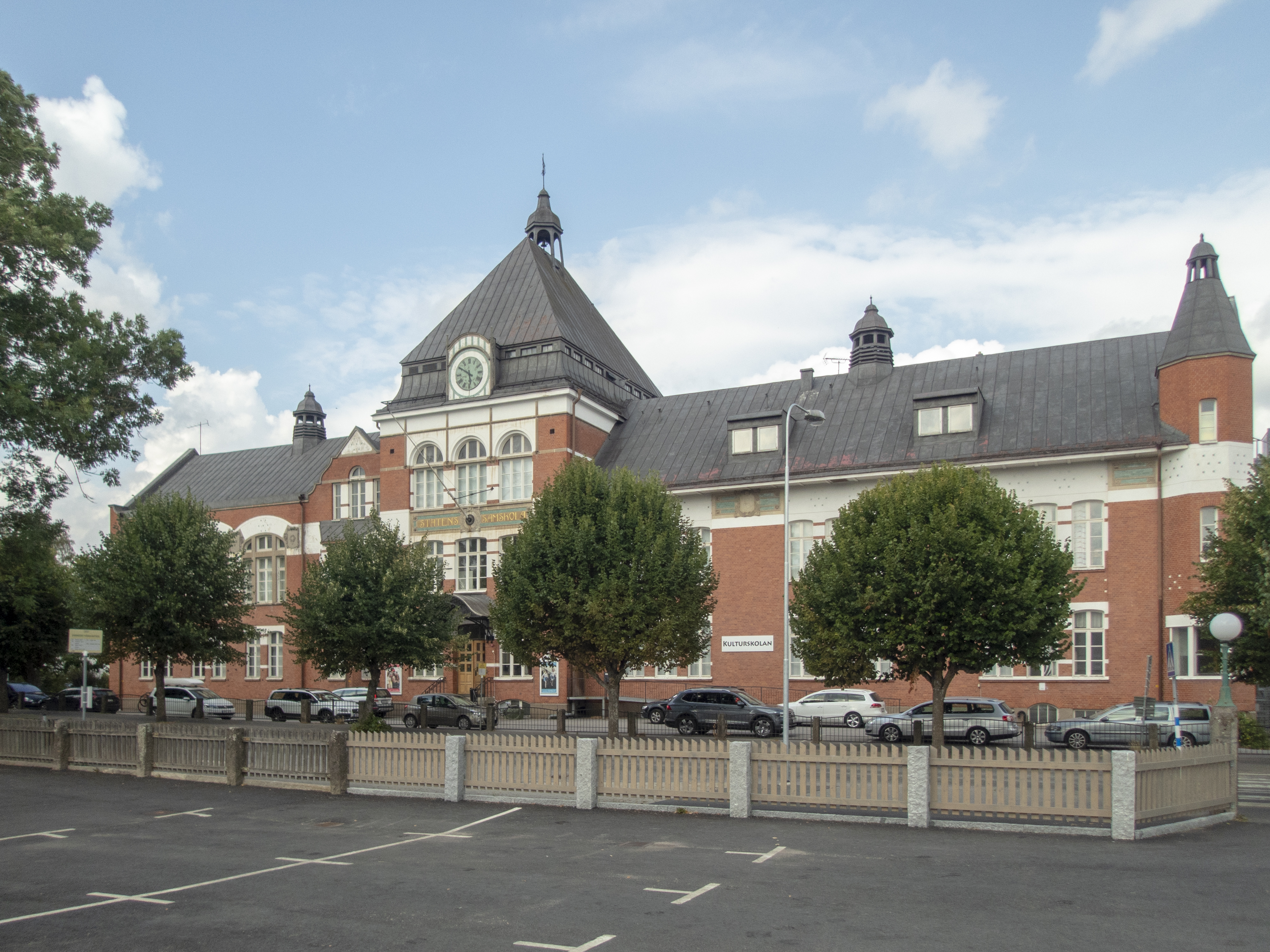 Vimmerby Kulturskola, ursprungligen Stångådalens samrealskola, byggnadsår 1905-1908. Arkitekt Georg A. Nilsson